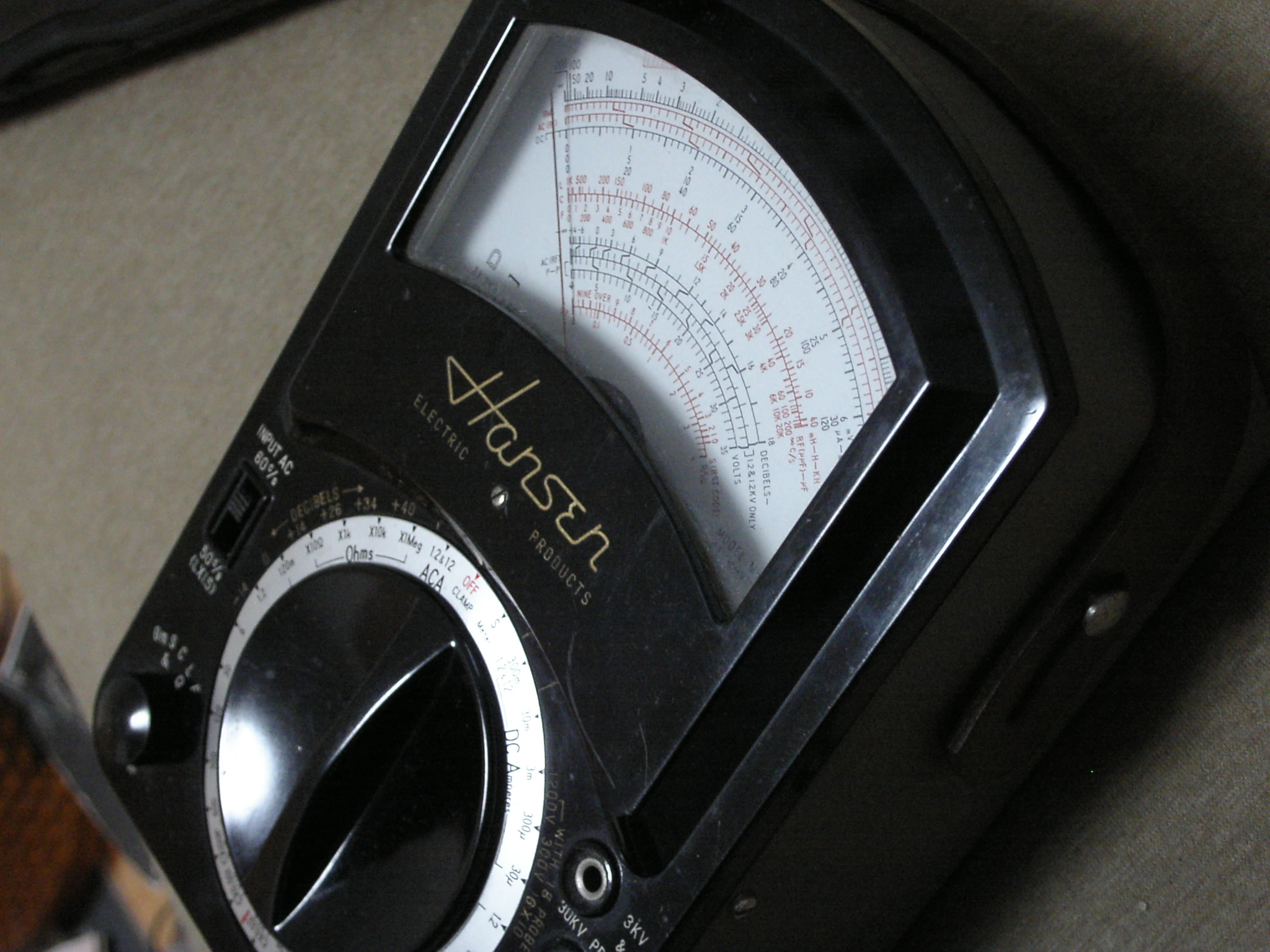 古い回路計